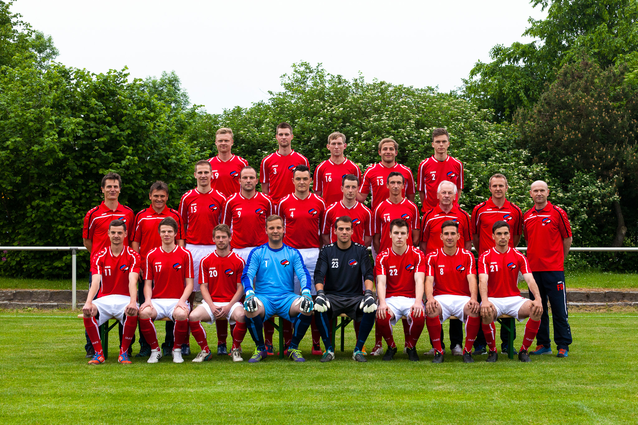 Hornjoserbsce: Serbska muska wubranka za Europeadu 2016